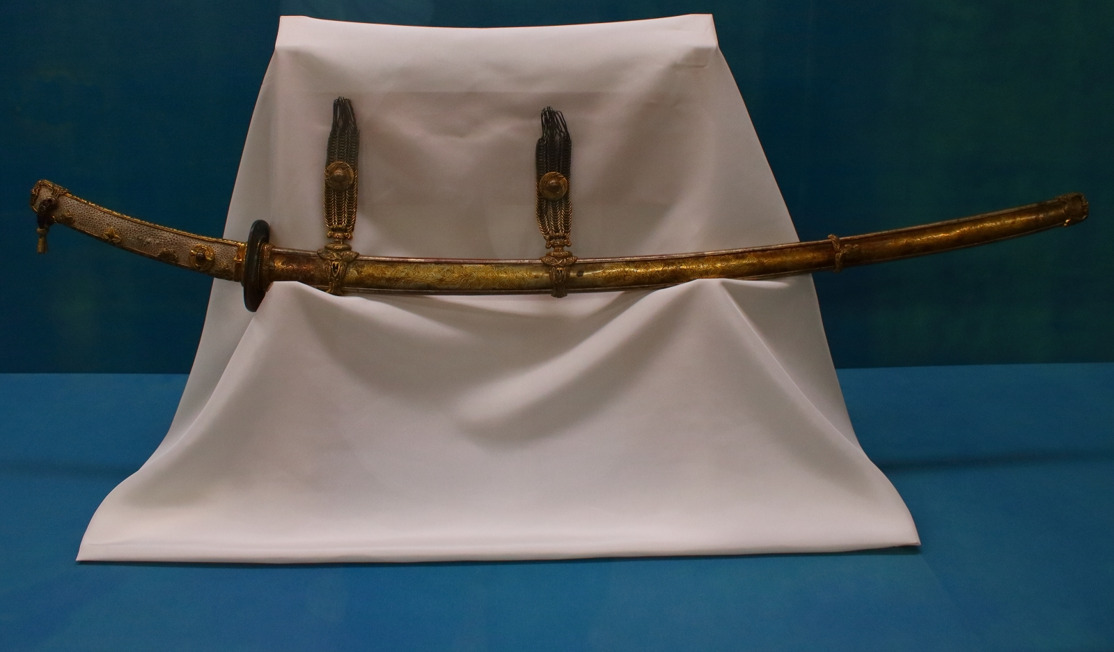 松藤文兵庫鎖太刀（重要文化財）、鎌倉時代・13世紀。東京国立博物館。